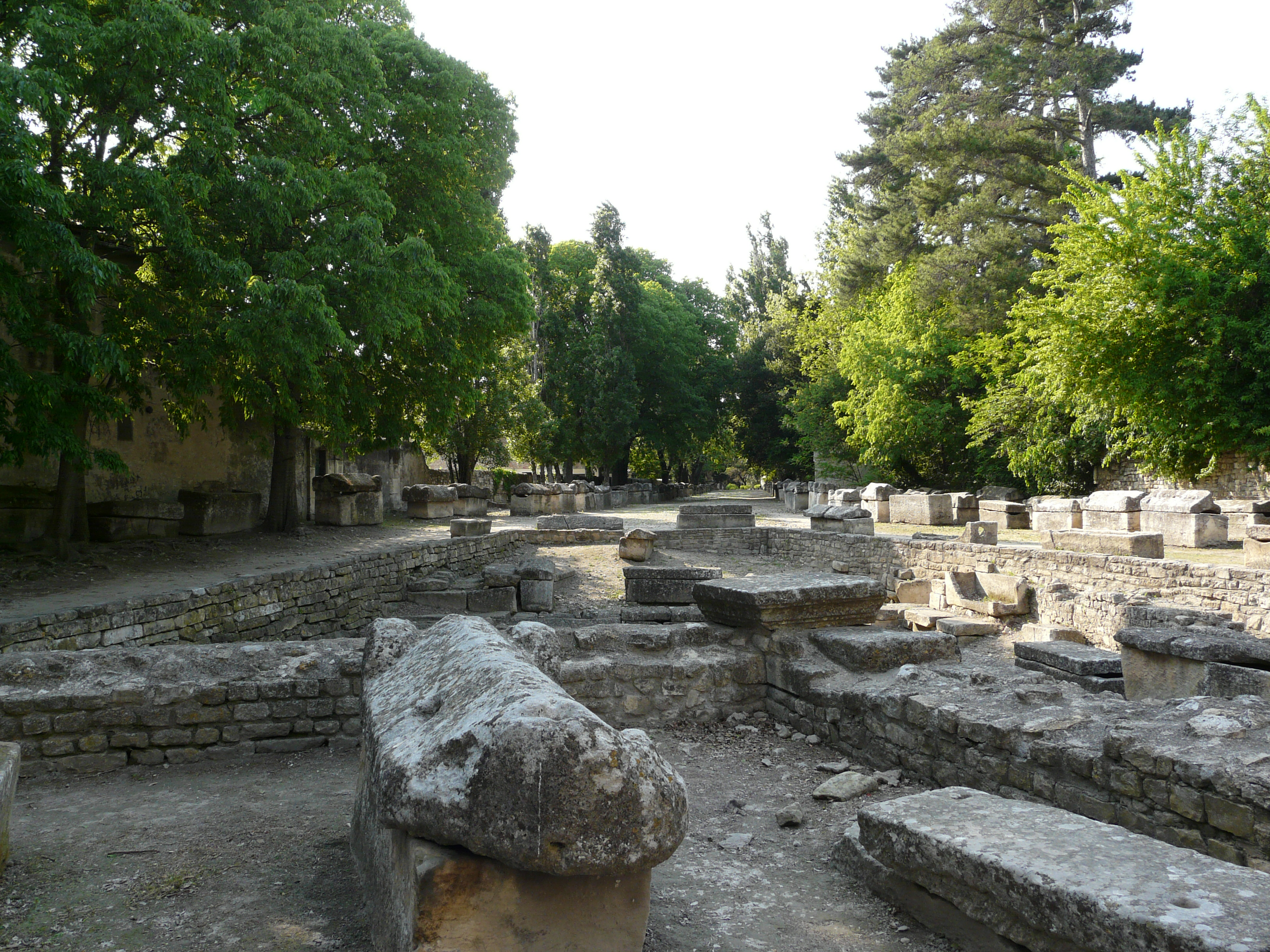 Nécropole des Alyscamps - Eglise Saint-Honorat dans le dos